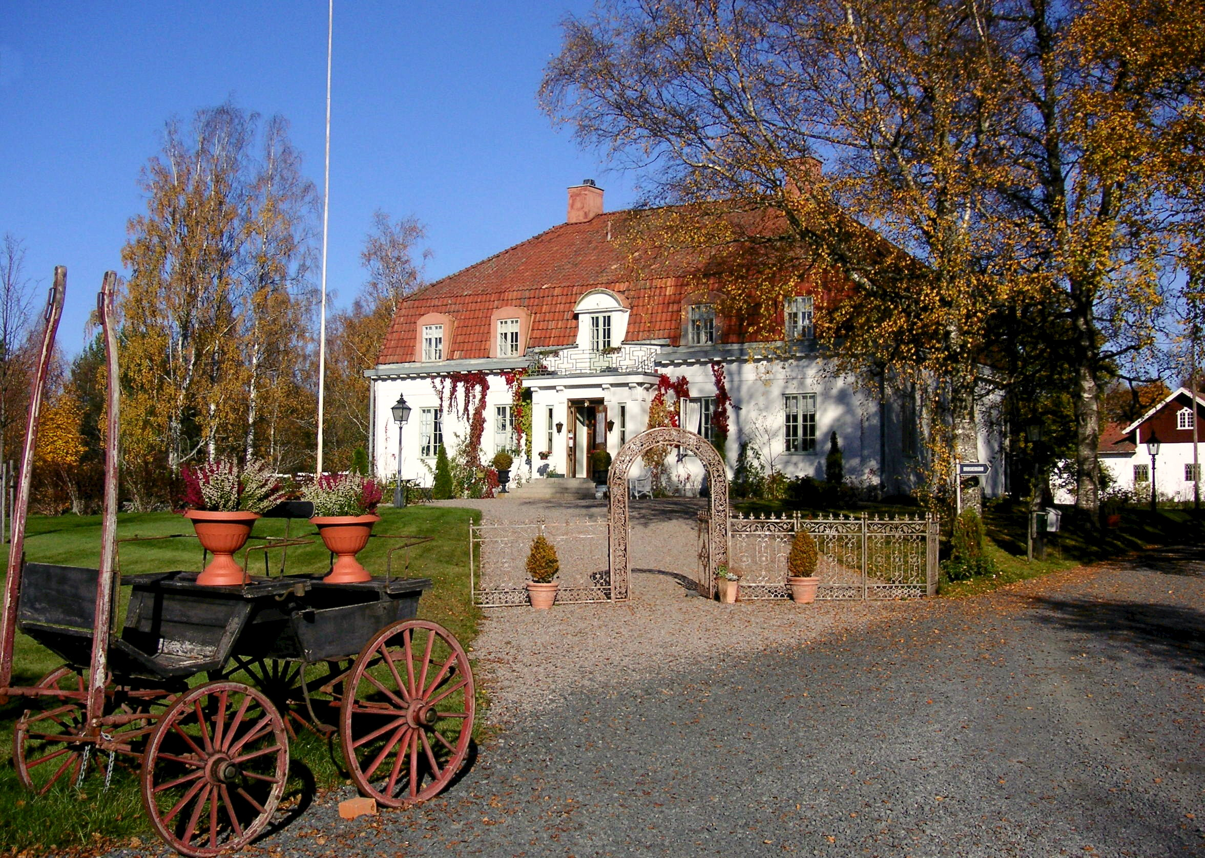 Nyhammar Herrgård